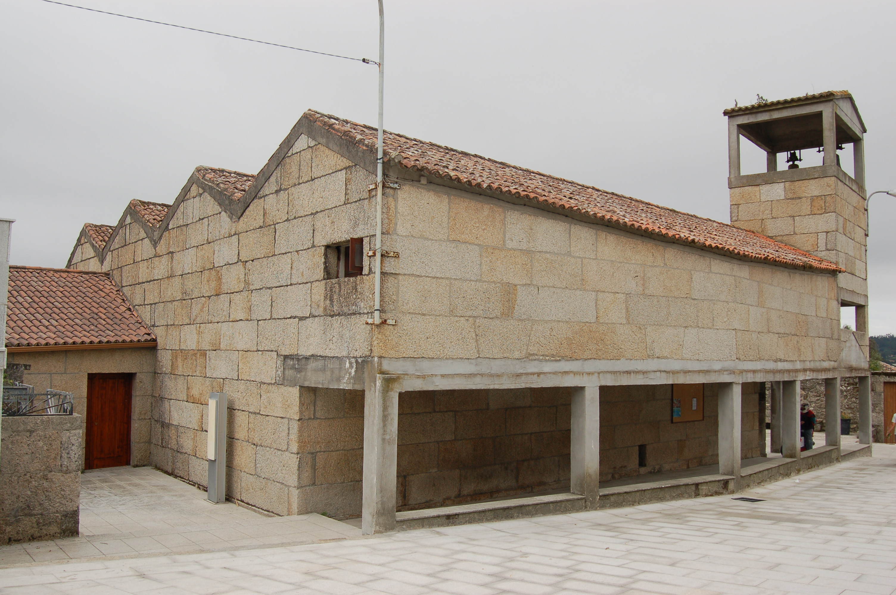 Igrexa parroquial de Nantes (Sanxenxo)